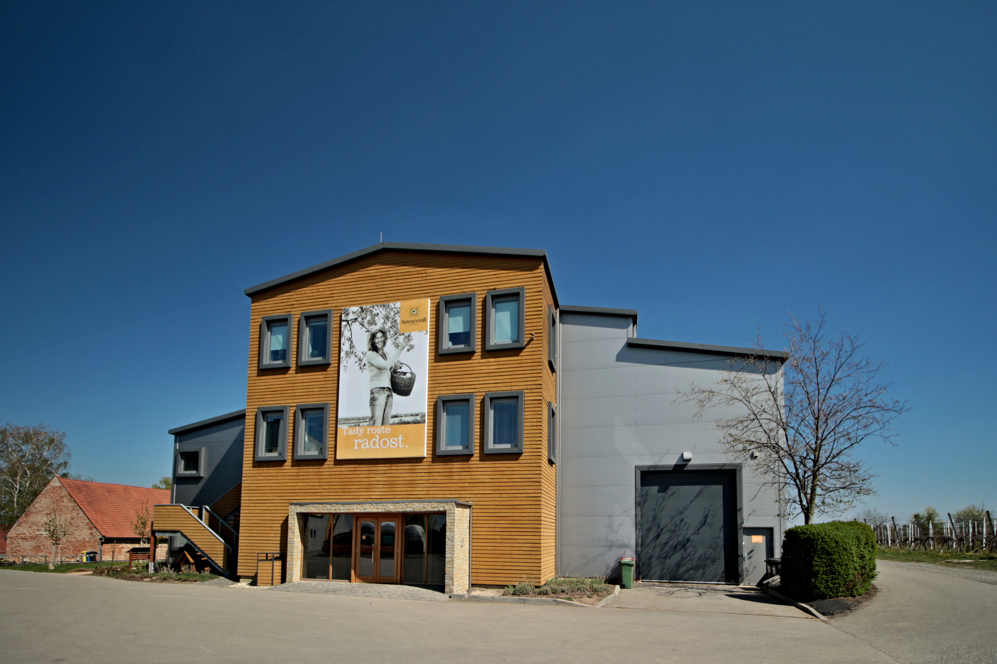 Čejkovice Bylinkový ráj Sonnentor